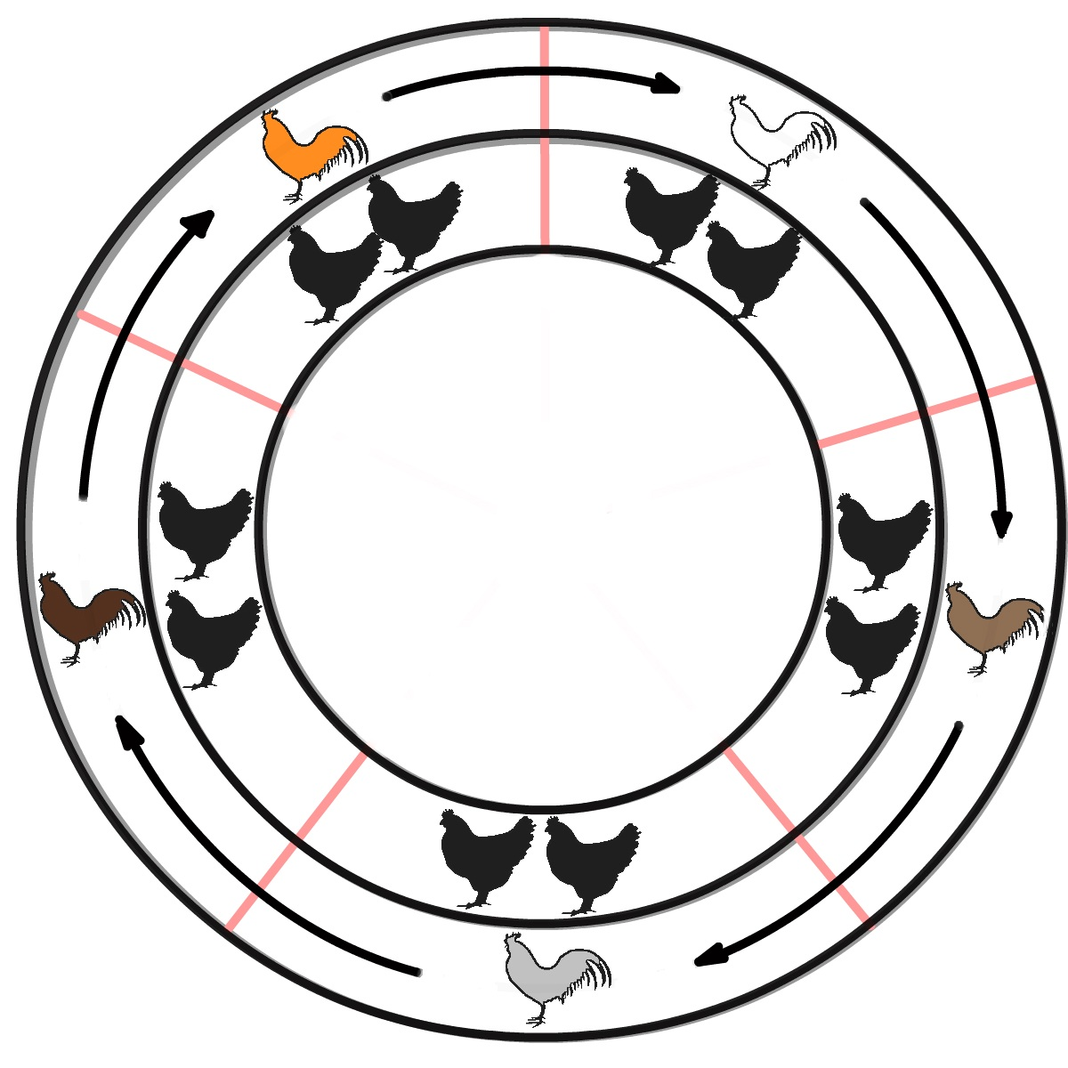 Schema eines Zuchtringes mit Hahnetausch